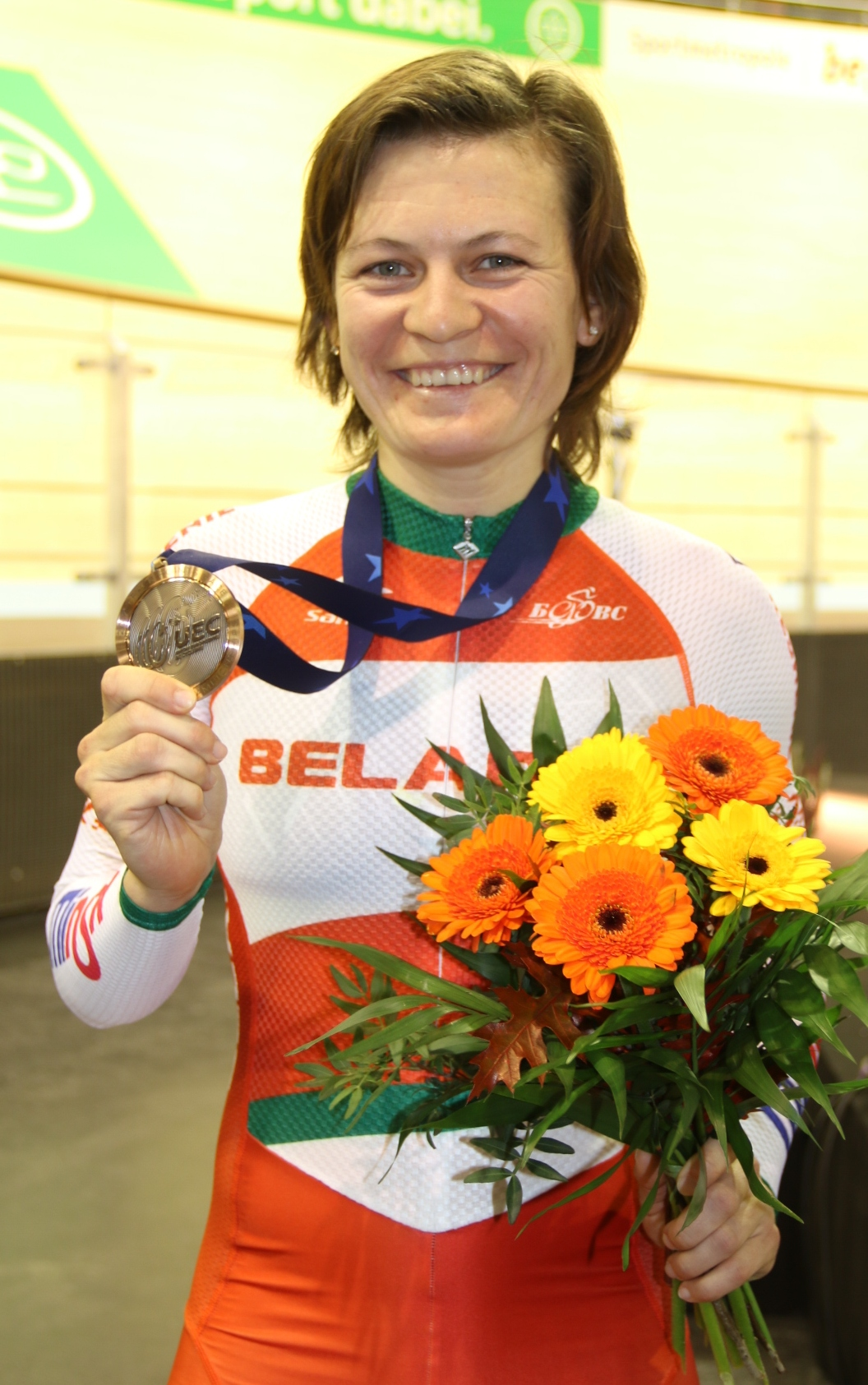 Tatsiana Sharakova, weißrussische Radsportlerin